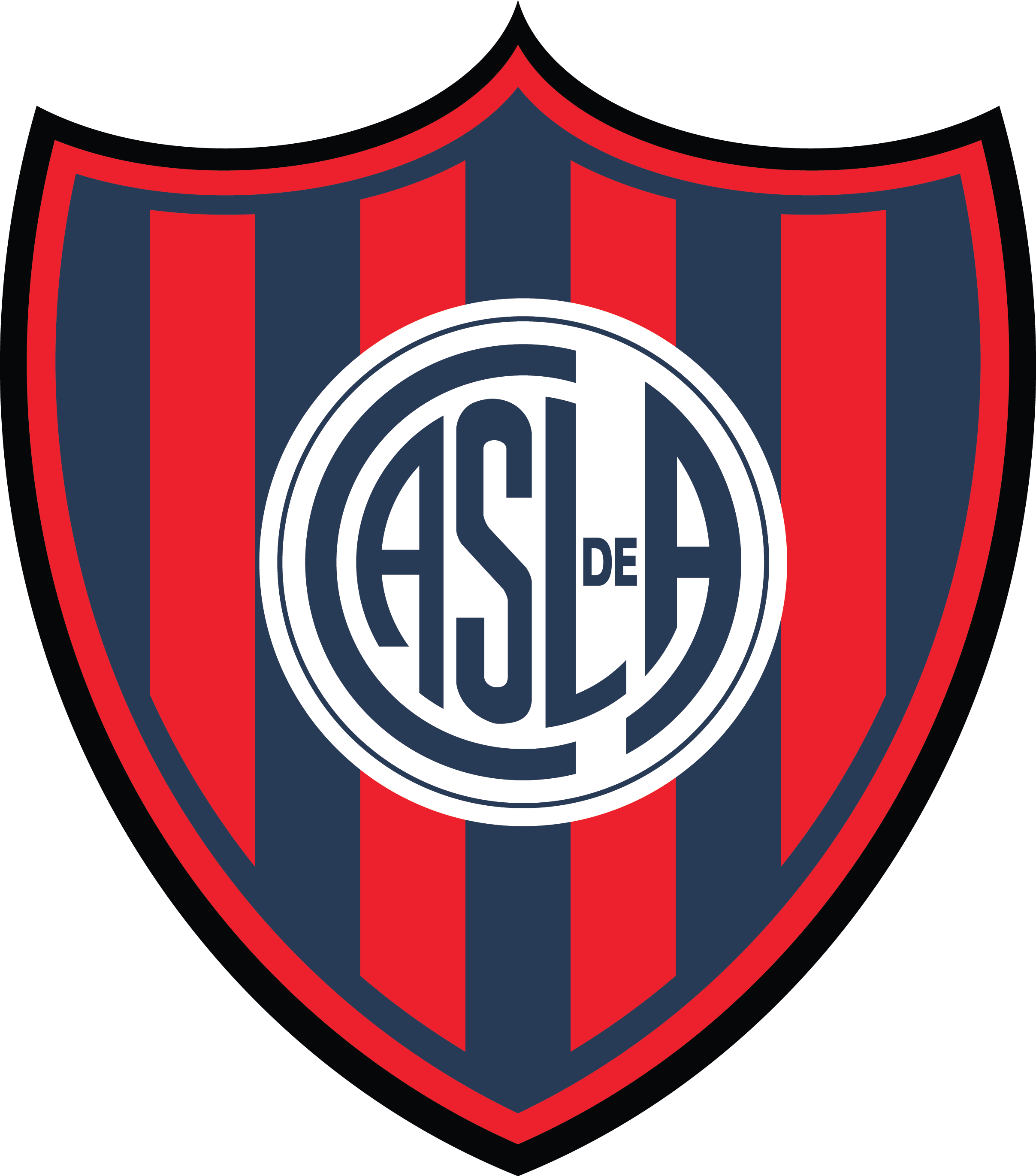 Club Atlético San Lorenzo de Almagro